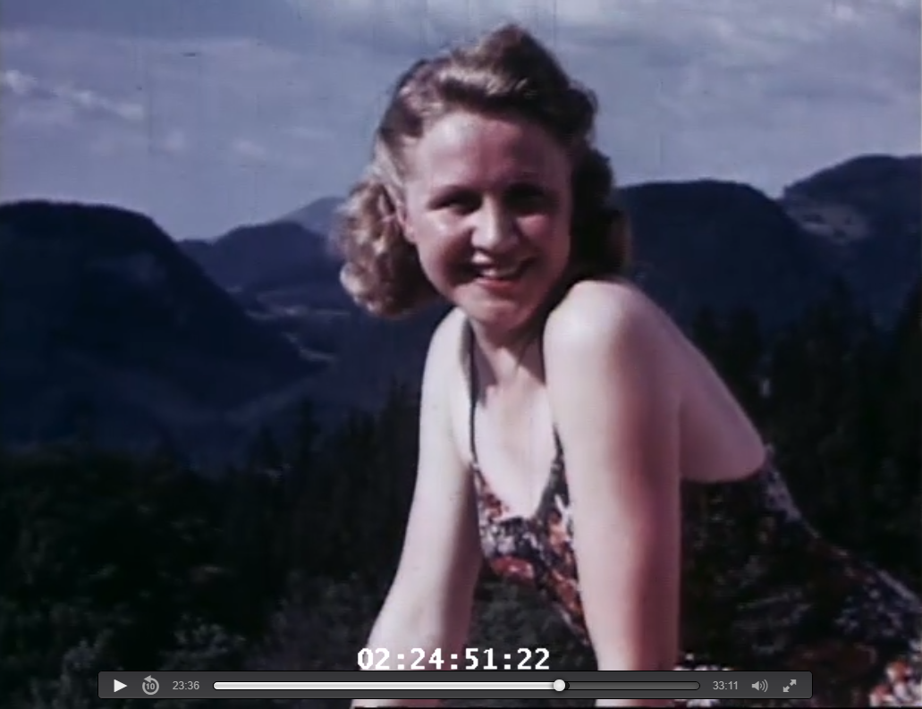 Else von Moellendorff auf der Terrasse des Berghofs, um 1938